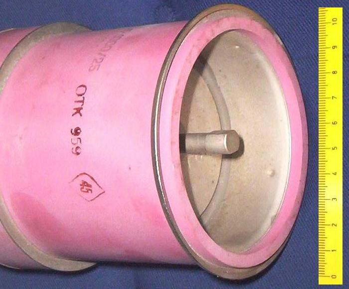 Wasserstoff-Thyratron, 25kV/1000A, Russland, Typ TGI-1000/25, Massstab Zahlen in Zentimeter